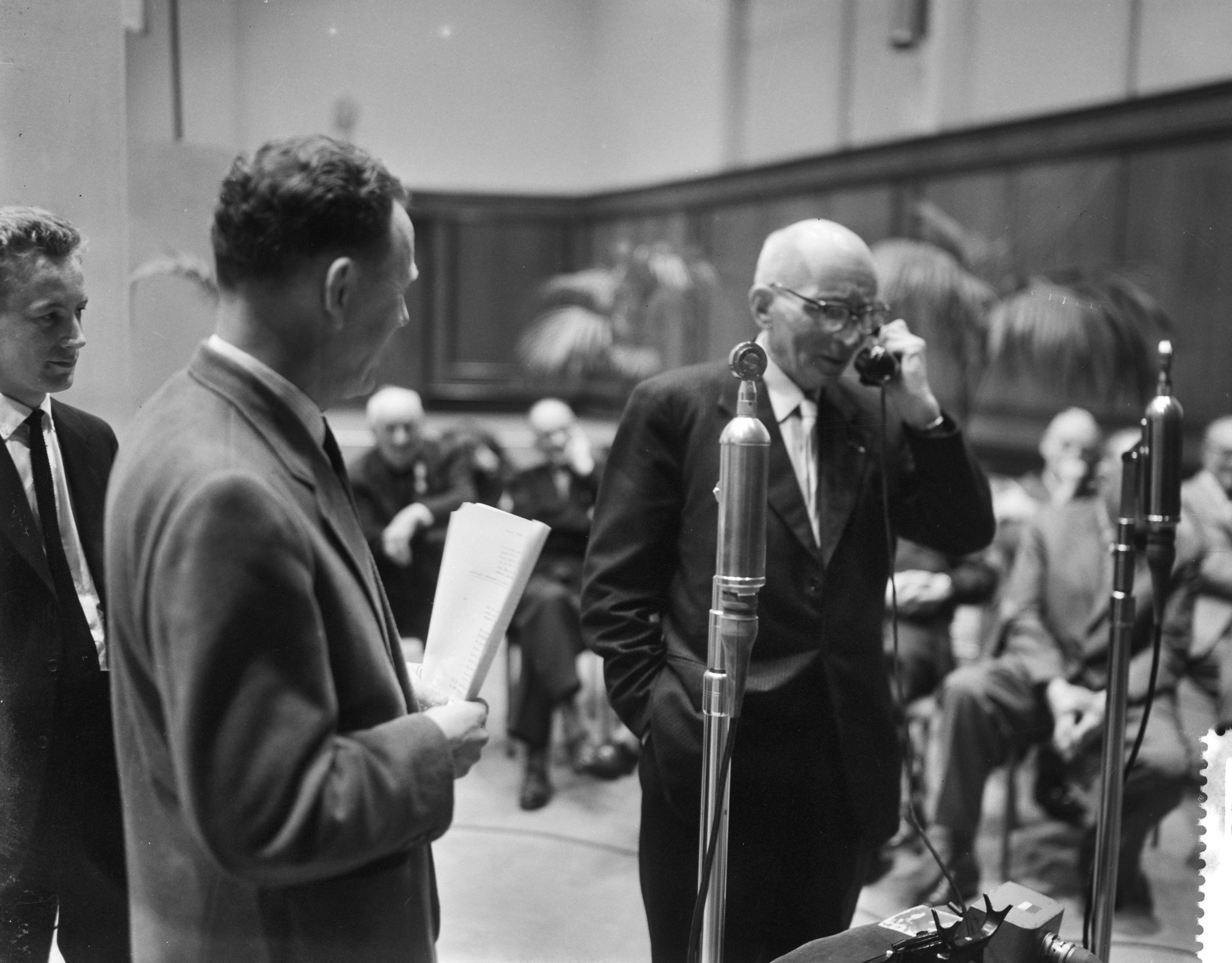 Collectie / Archief : Fotocollectie Anefo Reportage / Serie : [ onbekend ] Beschrijving : Radioprogramma "Dit is uw leven" , hoofdpersoon Jan Strijbos Datum : 25 maart 1959 Fotograaf : Noske, J.D. / Anefo Auteursrechthebbende : Nationaal Archief Materiaalsoort : Negatief (zwart/wit) Nummer archiefinventaris : bekijk toegang 2.24.01.04 Bestanddeelnummer : 910-2419